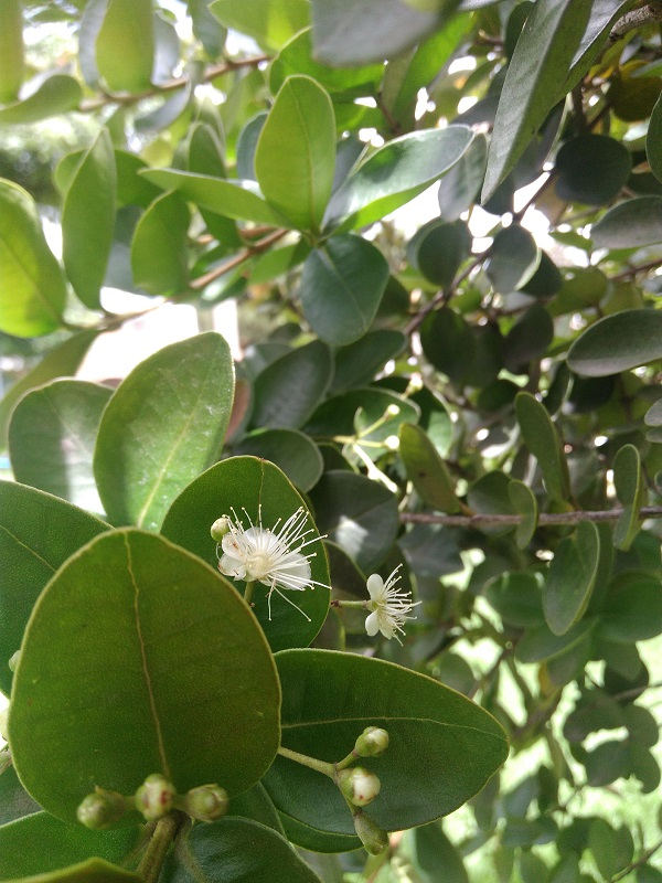 Flor de Mosiera longipes